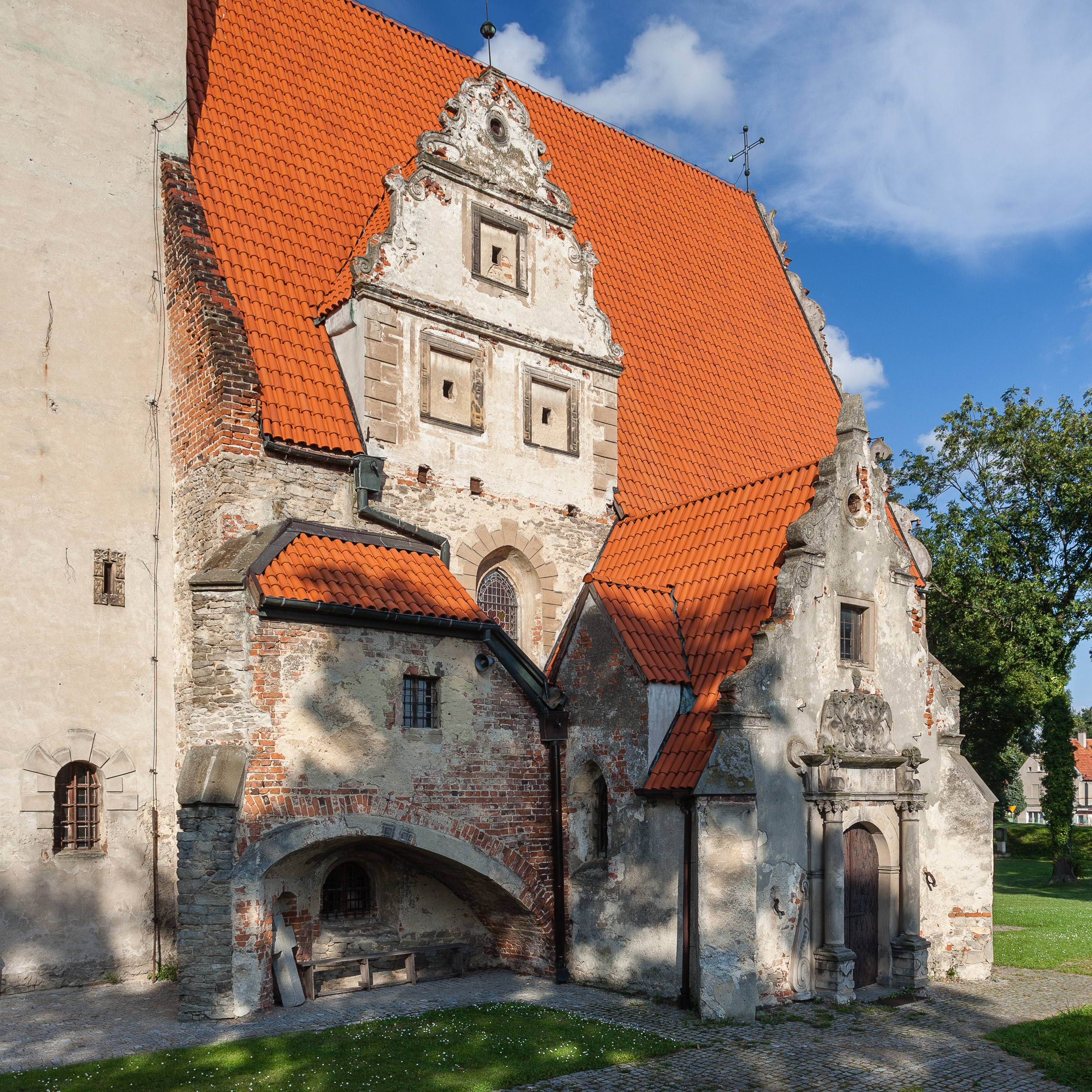 Żórawina, Al. Niepodległości - kościół pomocniczy pw. św. Trójcy (zabytek nr A/1252/88)